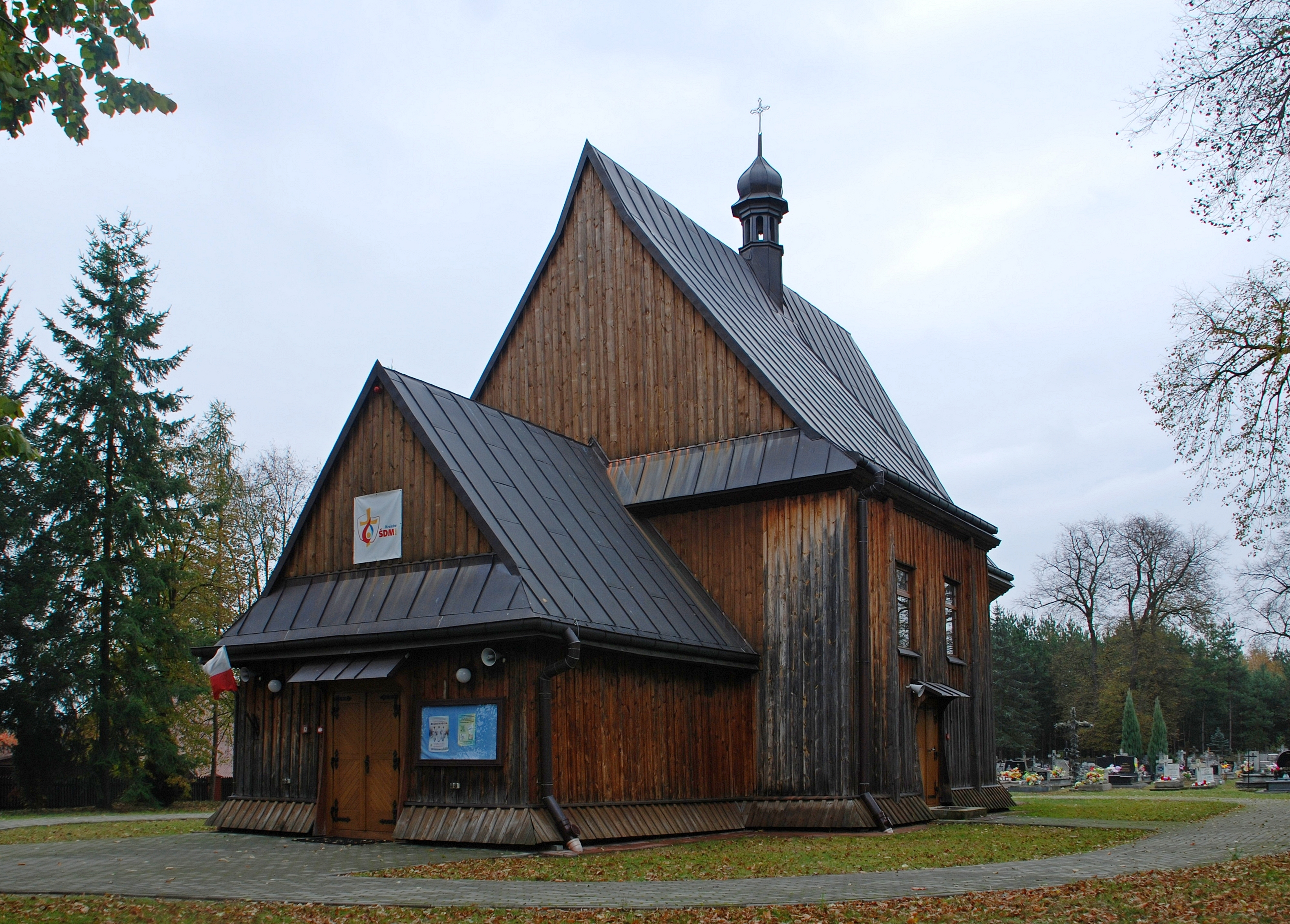 wieś Dąbrówka (powiat niżański)